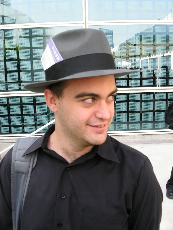 Frank Cifaldi - ACTION REPORTER